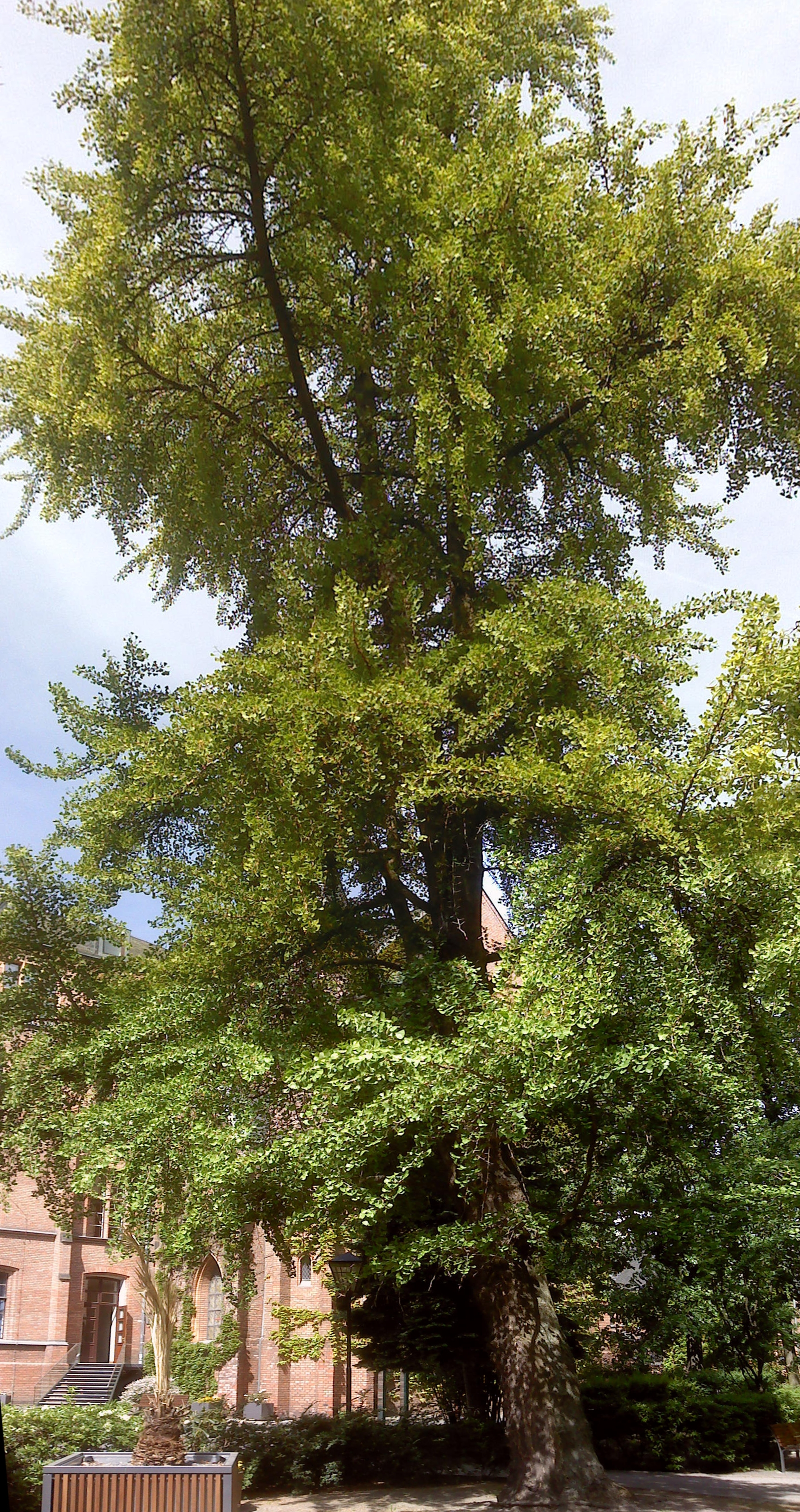 St. Hedwig-Krankenhaus: Ginkgo auf dem "historischen Innenhof"